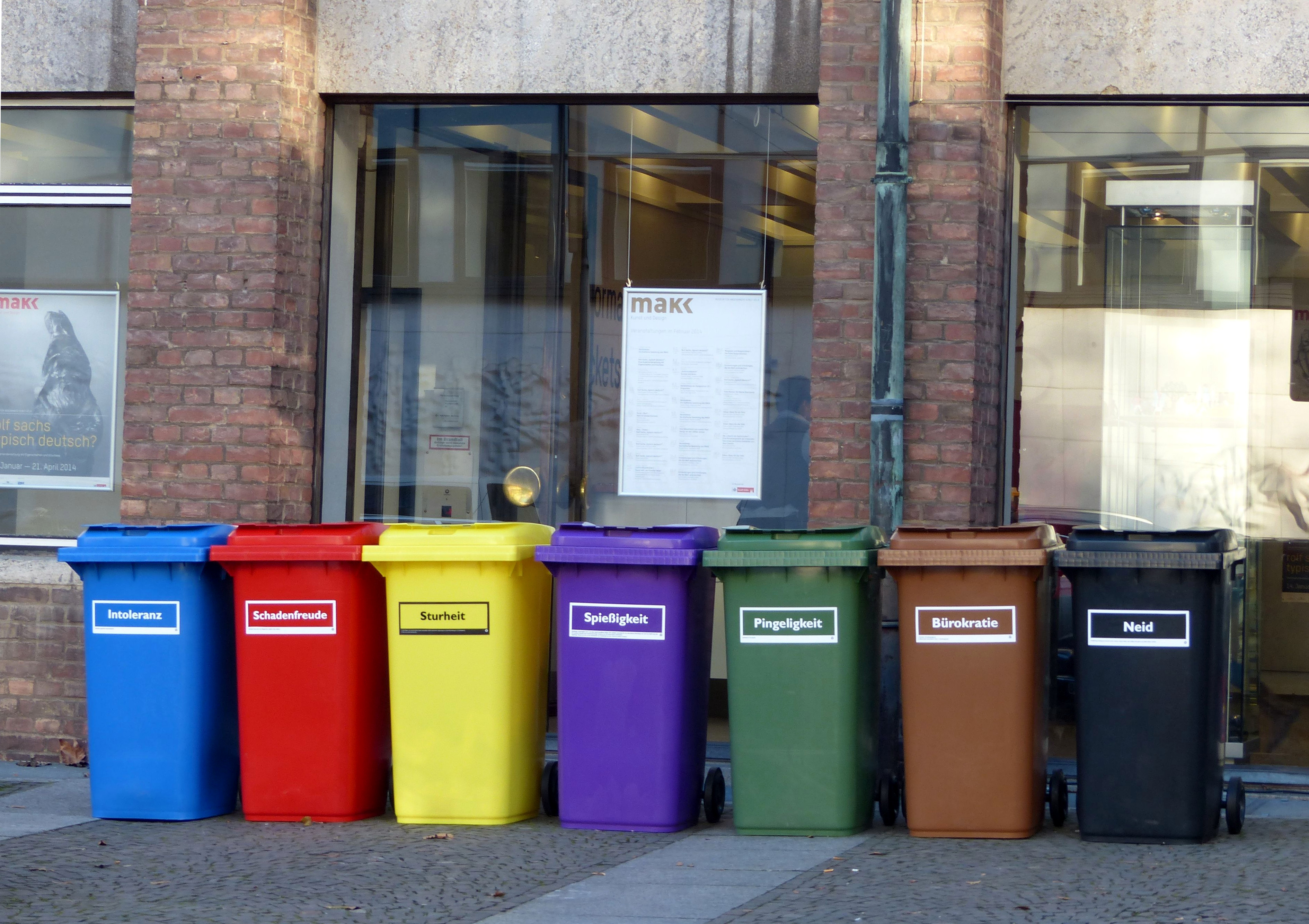 Eingang des Museums für Angewandte Kunst während einer Ausstellung Februar 2014